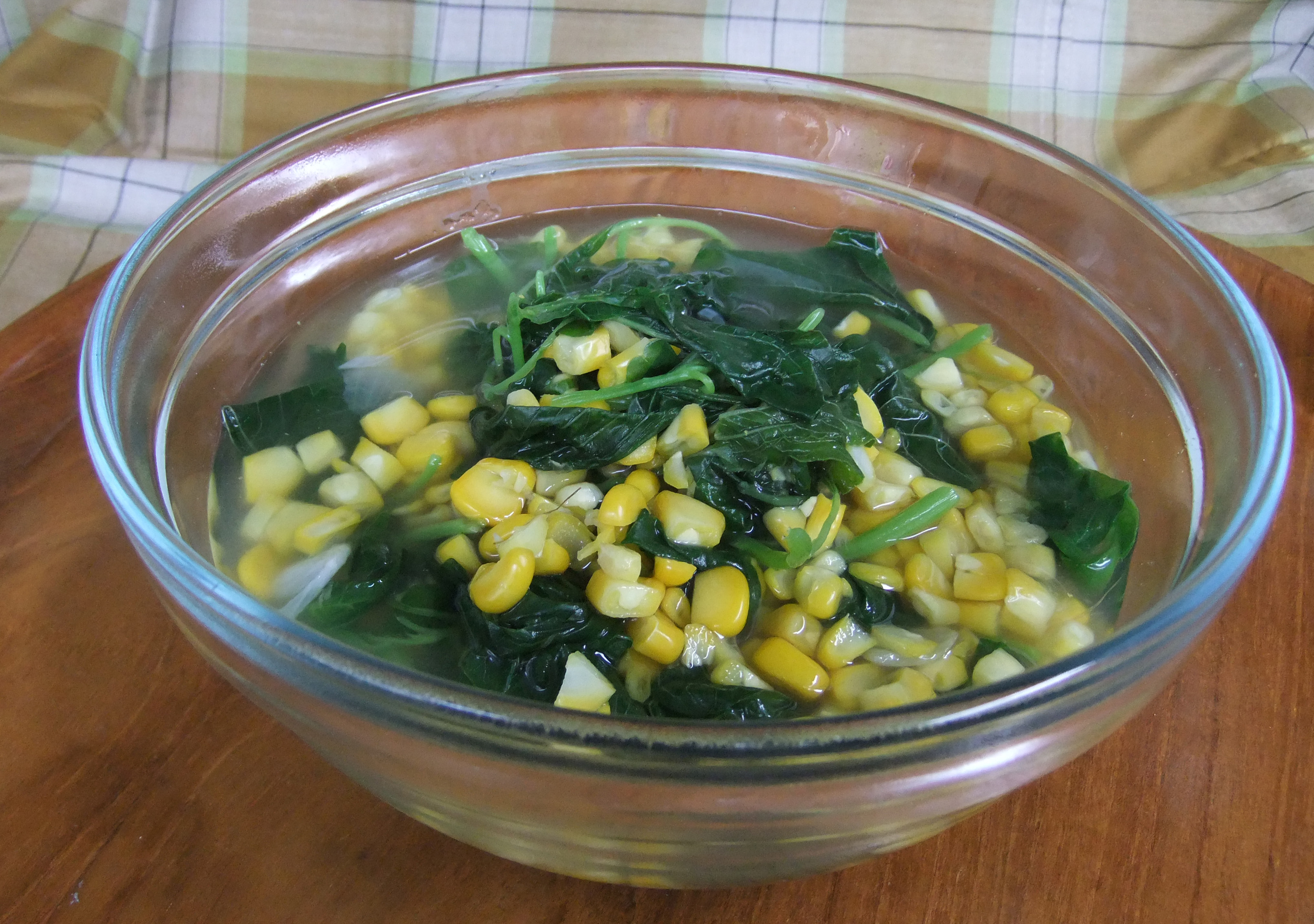 Sayur bening bayam dan jagung